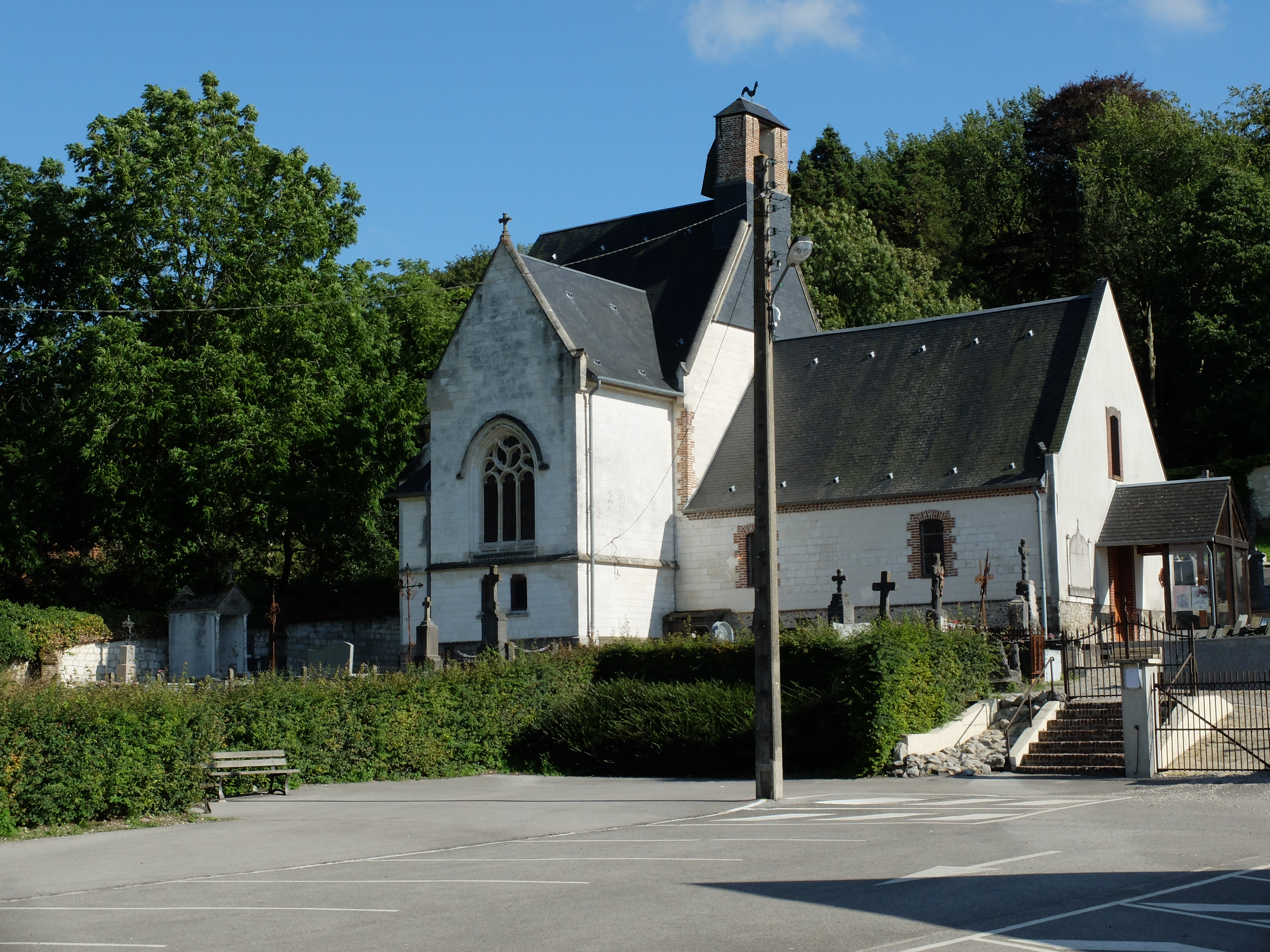 Vue de l'église Saint-Firmin de La Calotterie.